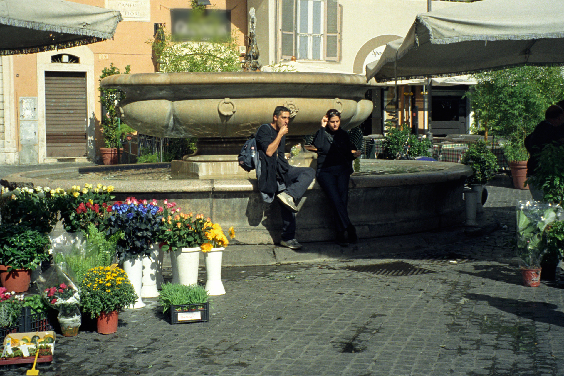 Roma, Campo de' Fiori